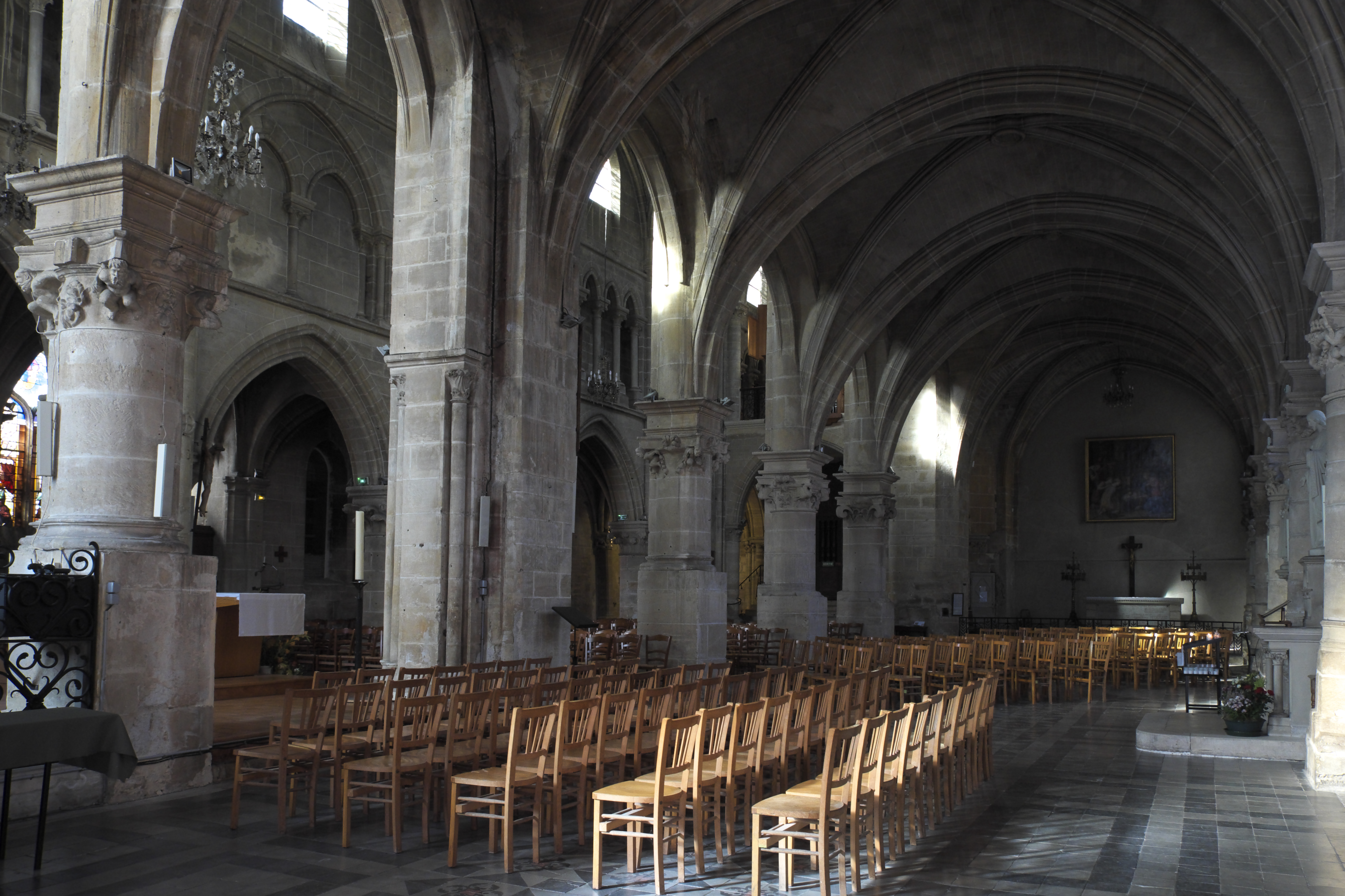 Katholische Pfarrkirche Saint-Germain in Andrésy im Département Yvelines (Île-de-France/Frankreich), Innenraum